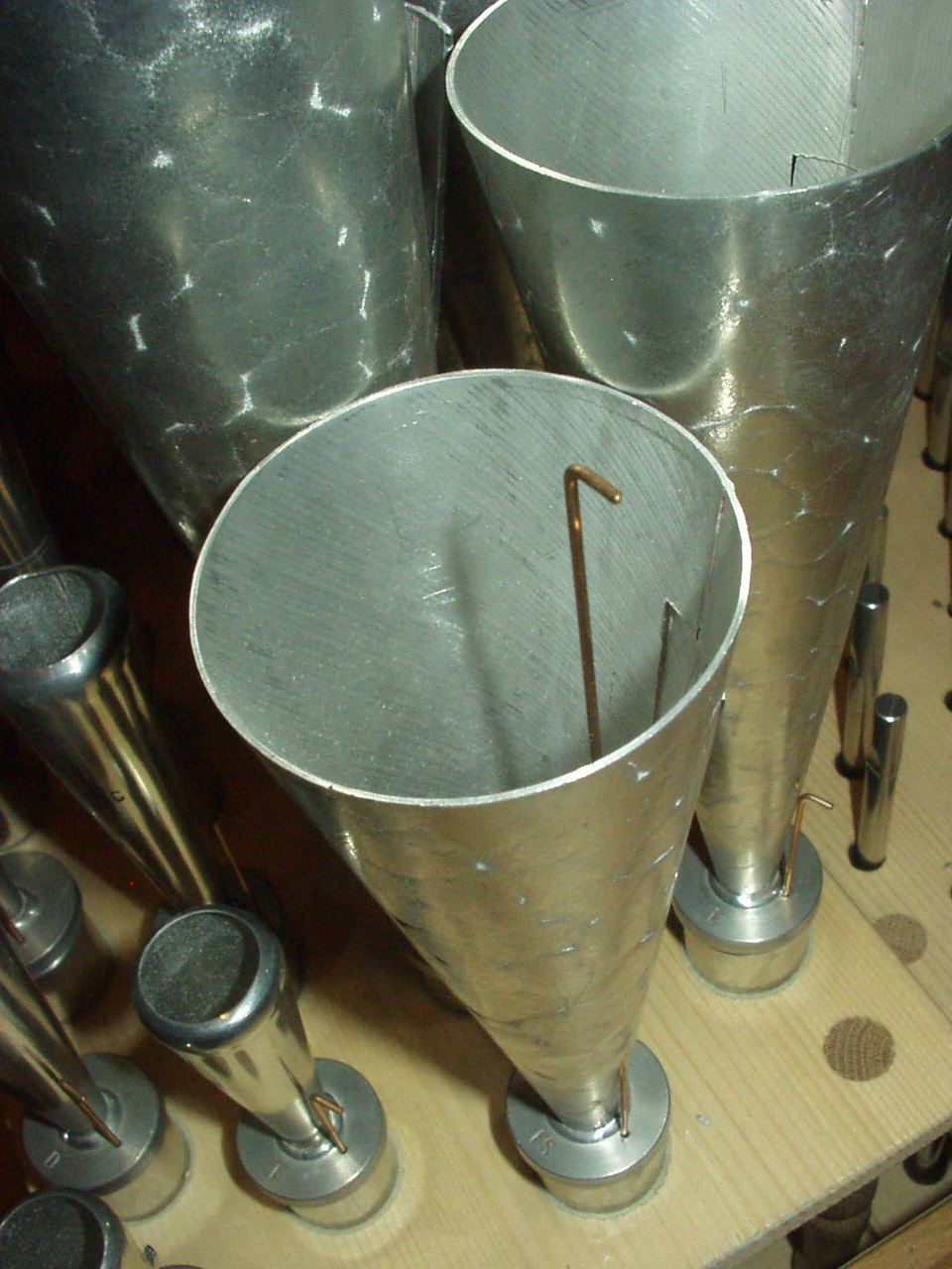 Nyelvsípok: Oboe 8' és Trompette 8'